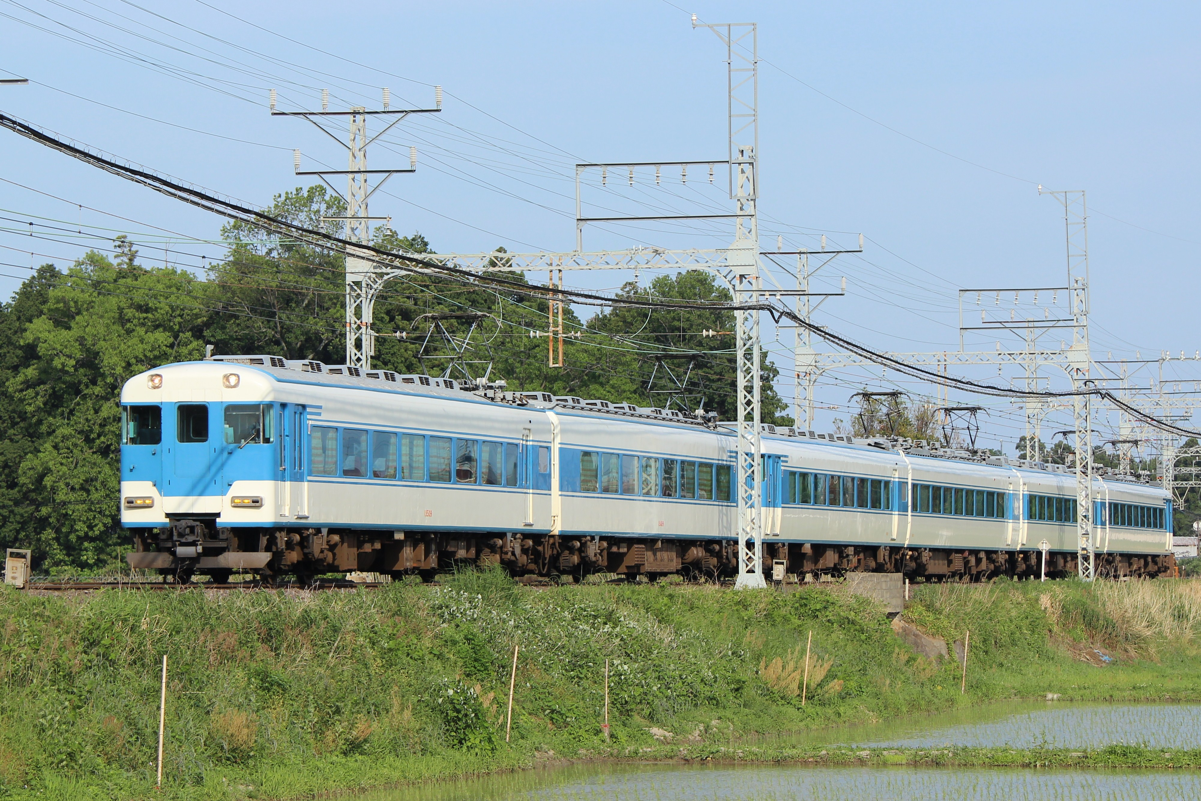 近鉄18400系と15200系の併結運行